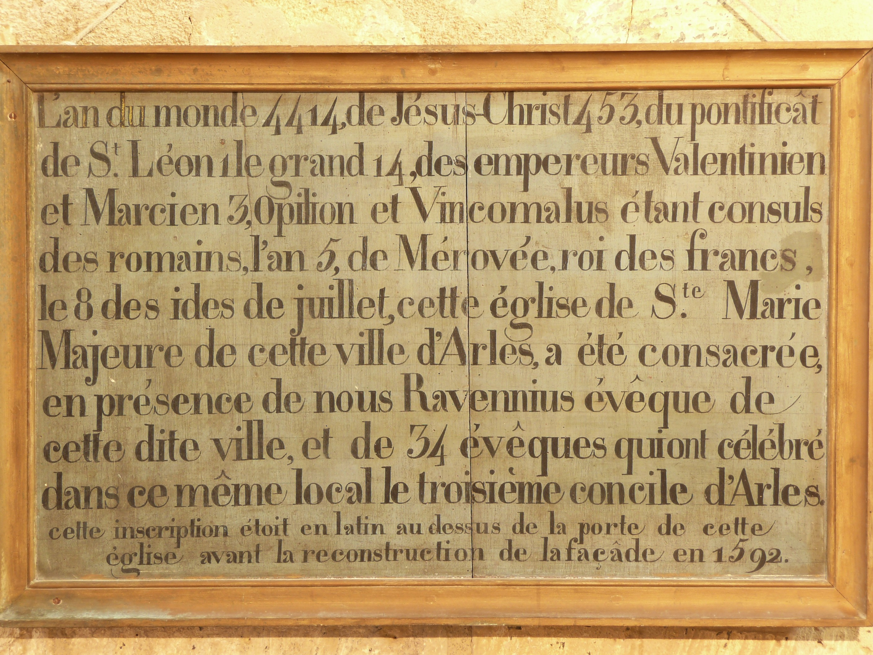 Arles (Bouches-du-Rhône, France), intérieur de l'église Notre-Dame-la-Major, chapelle St Martin, relevé d'une inscription figurant sur la façade de l'église jusqu'à sa réfection en 1592 et authentifiant sa consécration en 453 par l'archevêque d'Arles Ravennius lors du troisième concile d'Arles qui se tint dans cet édifice.